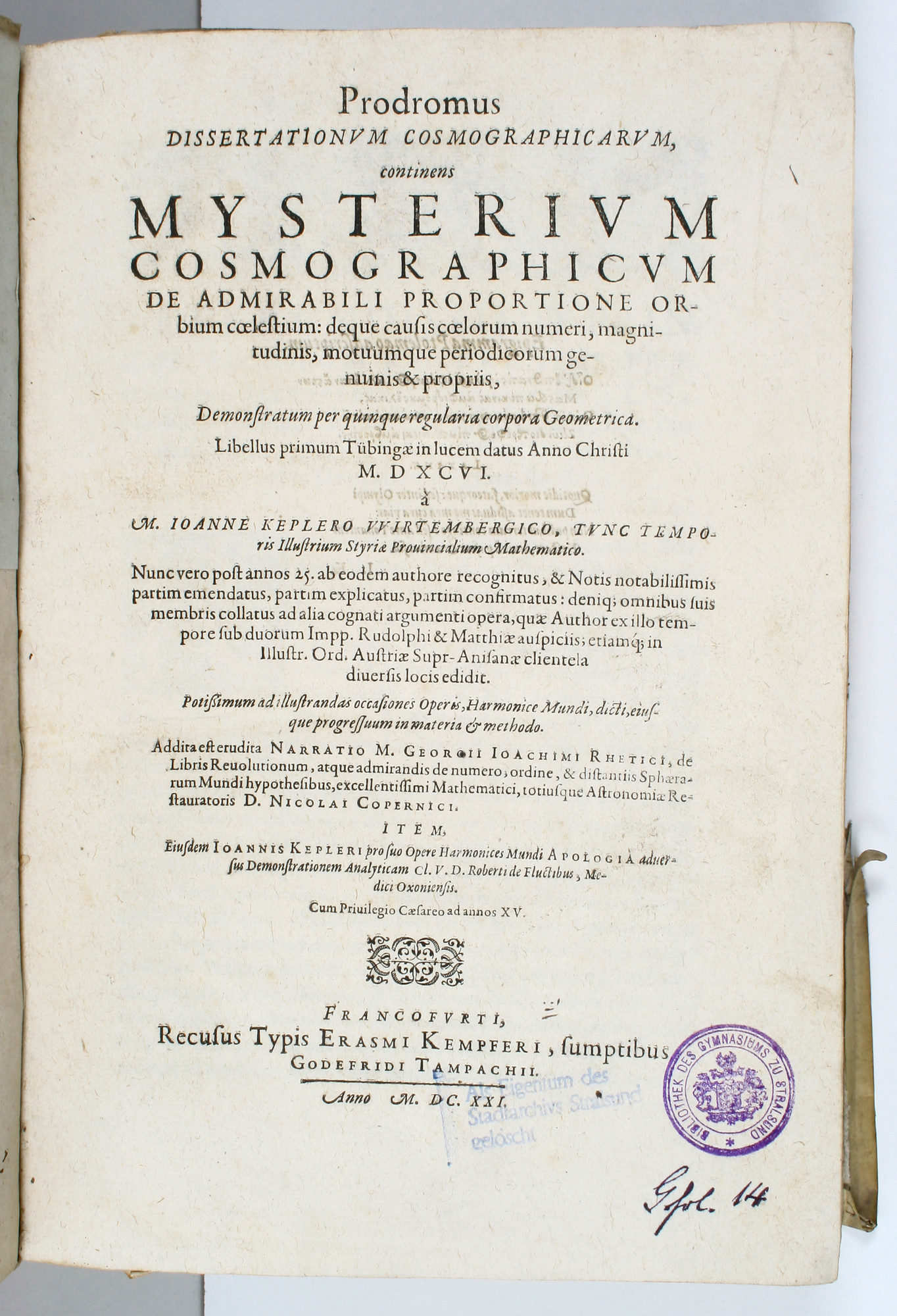 Titelblatt eines am 30. Oktober 2012 bei Reiss und Sohn in Königstein für 44.000 Euro versteigerten Kepler-Drucks aus der Gymnasialbibliothek Stralsund